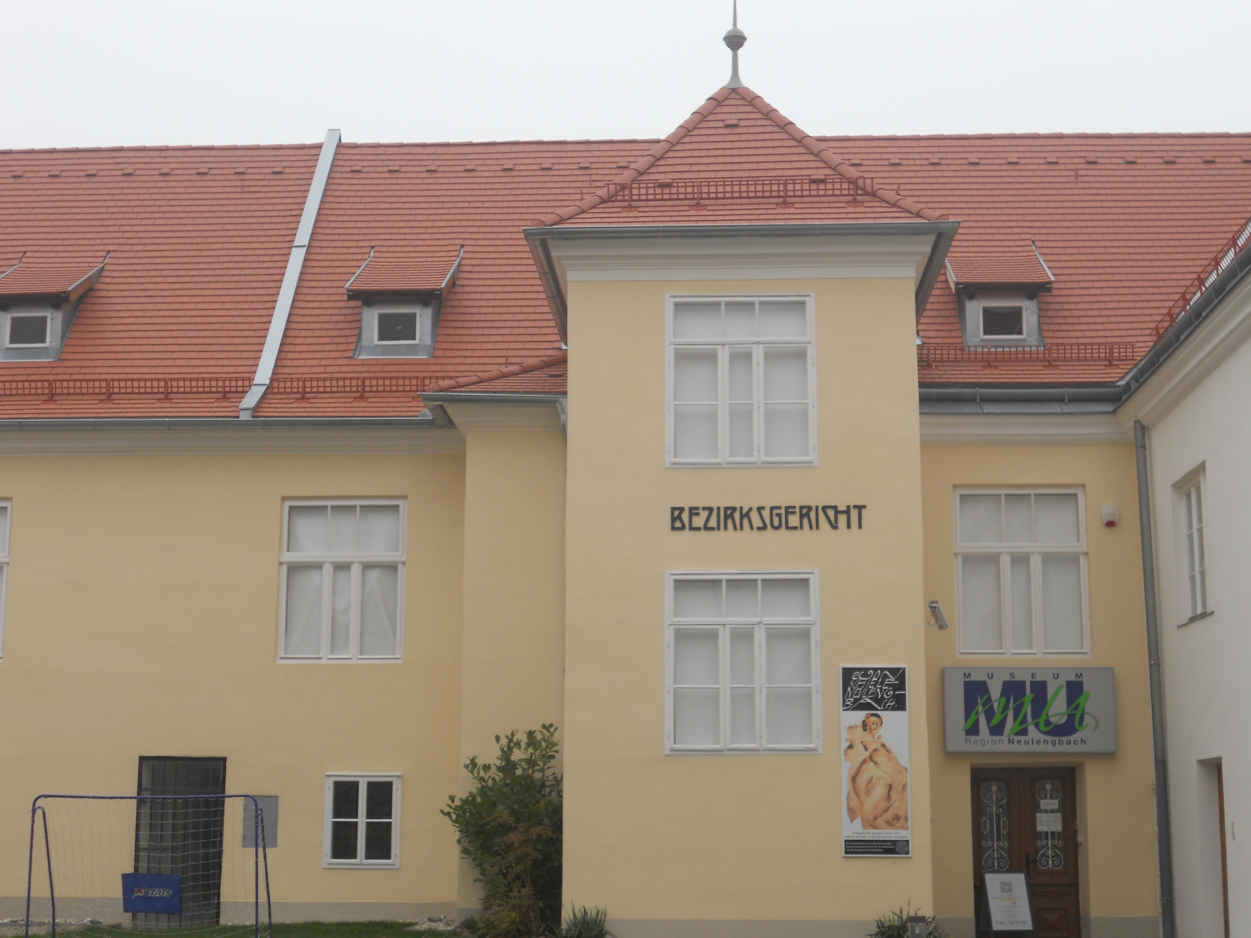 Bezirksgericht Neulengbach, Innenhof